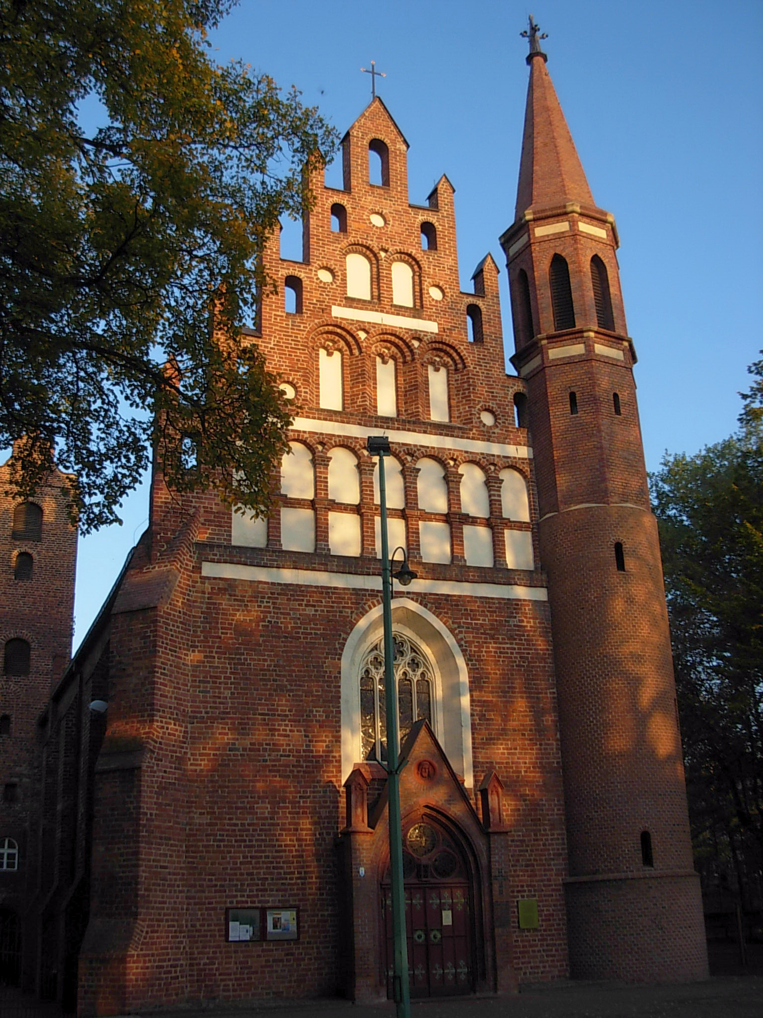 Kościół pobernardyński p.w. Najświętszej Maryi Panny Królowej Pokoju - front